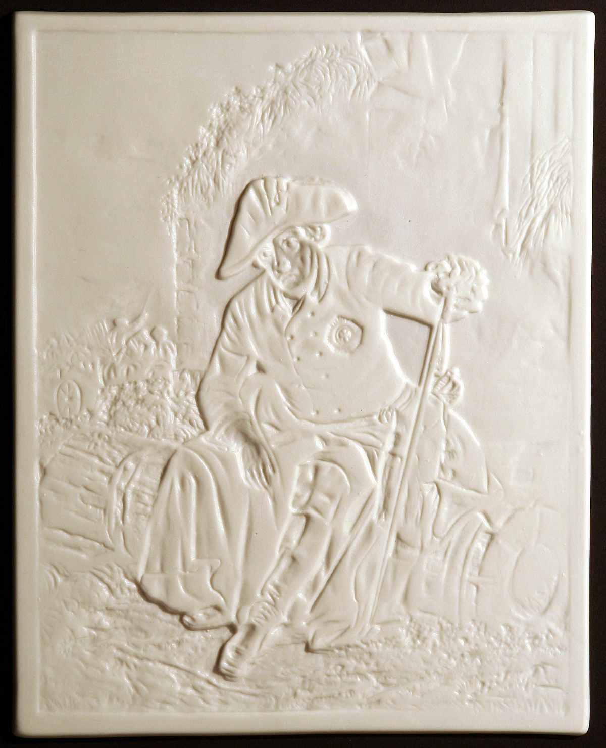 Lithophanie mit Auflicht, Vorlage: Gemälde „Friedrich II. nach der Schlacht von Kolin“ von Julius Schrader, Original im Museum der bildenden Künste Leipzig